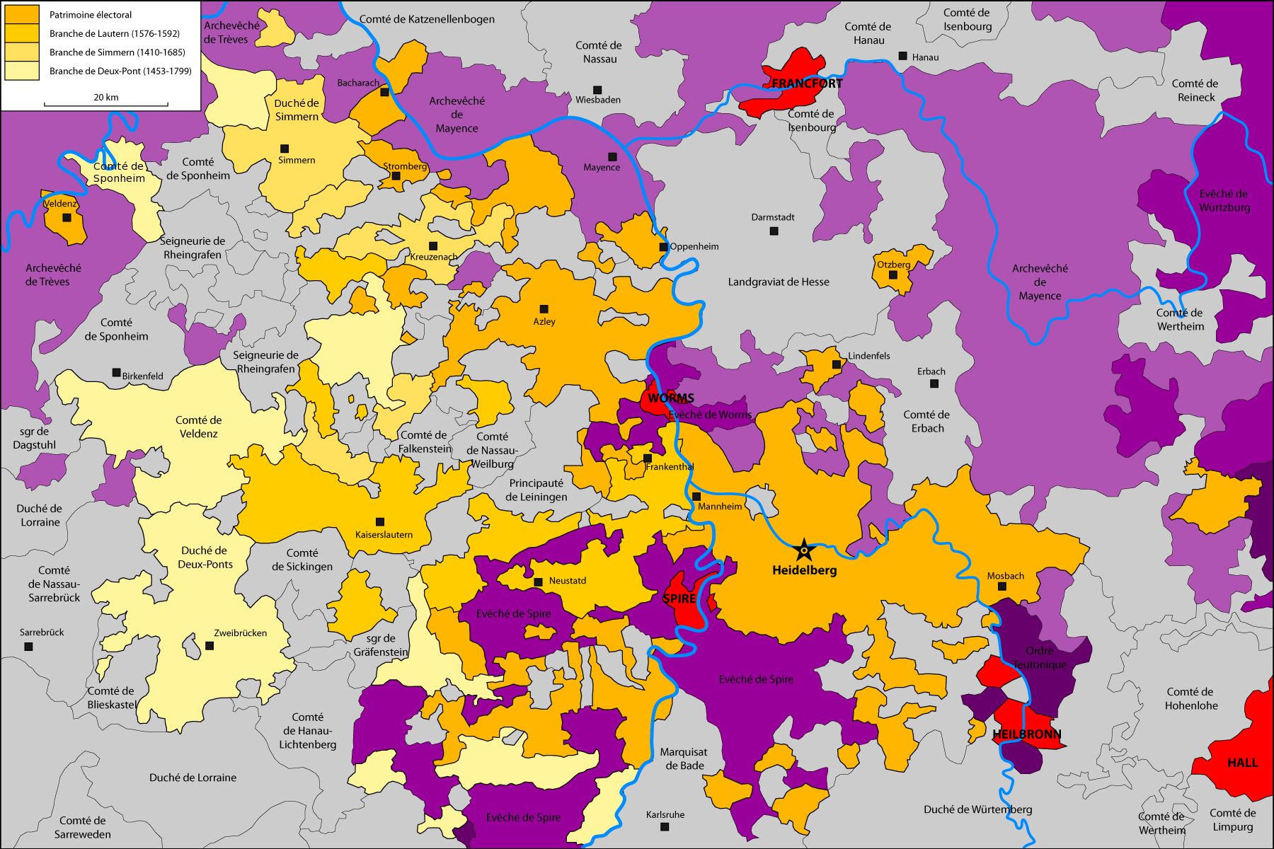 Possessions de la branche palatine de la maison de Wittelsbach (en jaune)